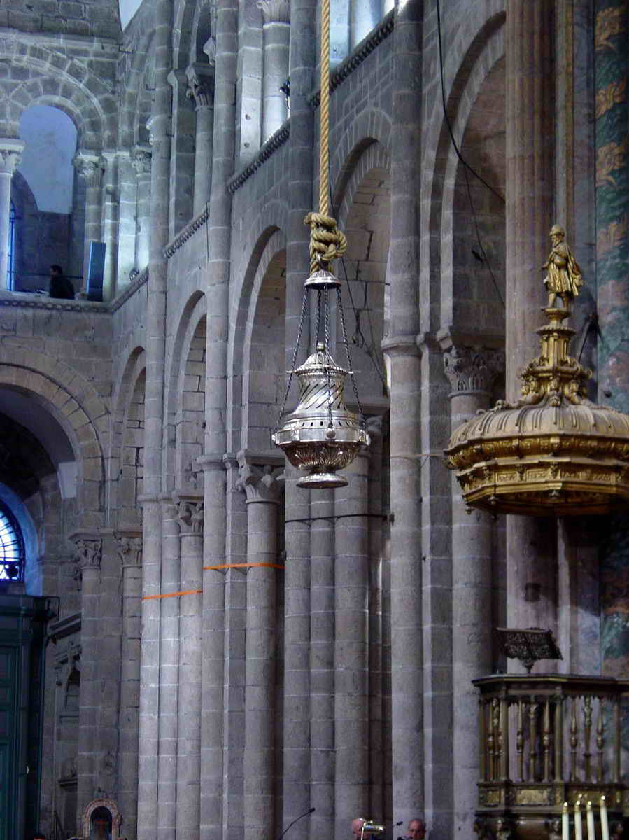 Santiago de Compostela - Galicia - España (Spain)